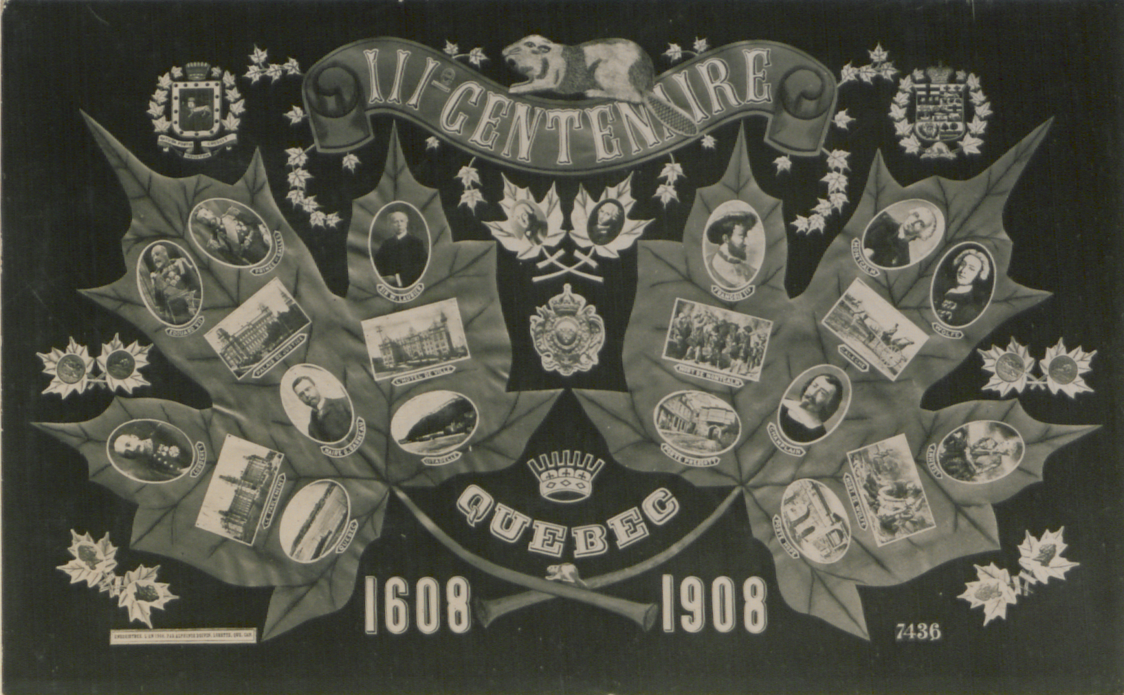 Original caption: “3me Centenaire de Quebec. 1608-1908.”